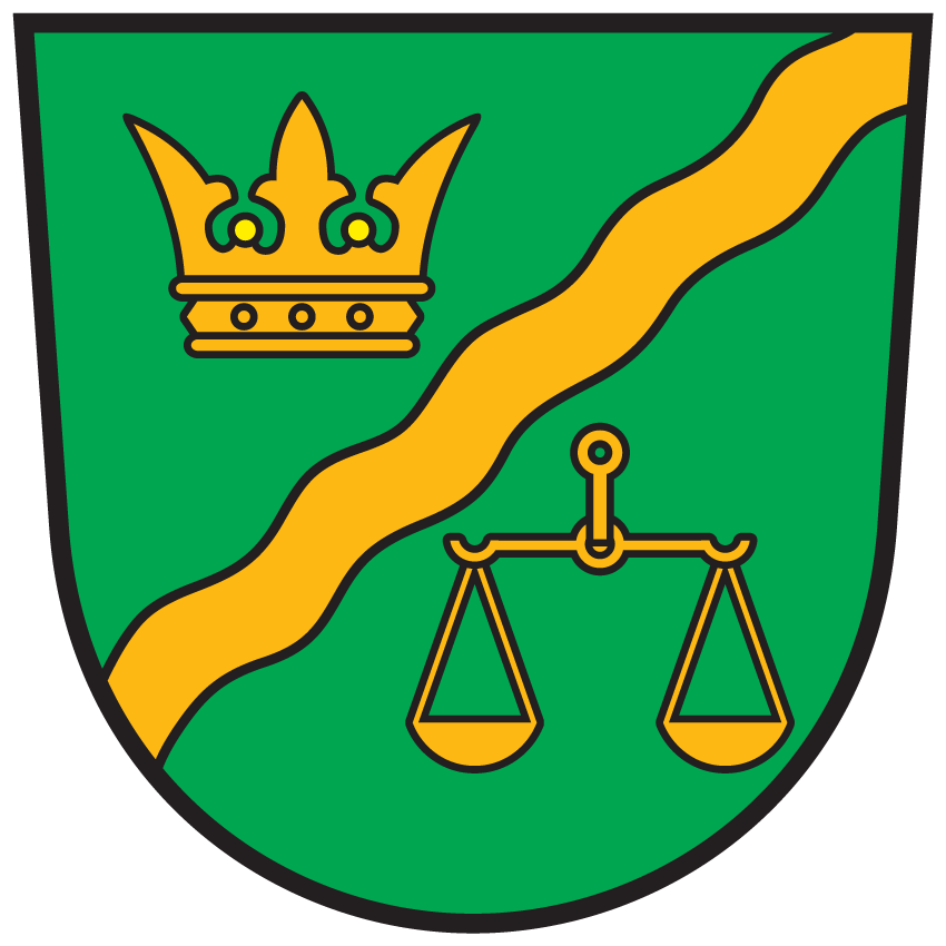 Wappen von Freistritz ob Bleiburg